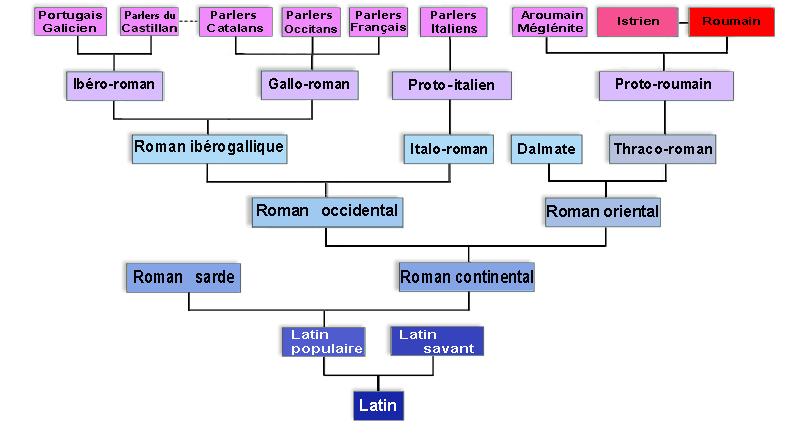 La place du roumain (rouge) parmi les langues romanes orientales.